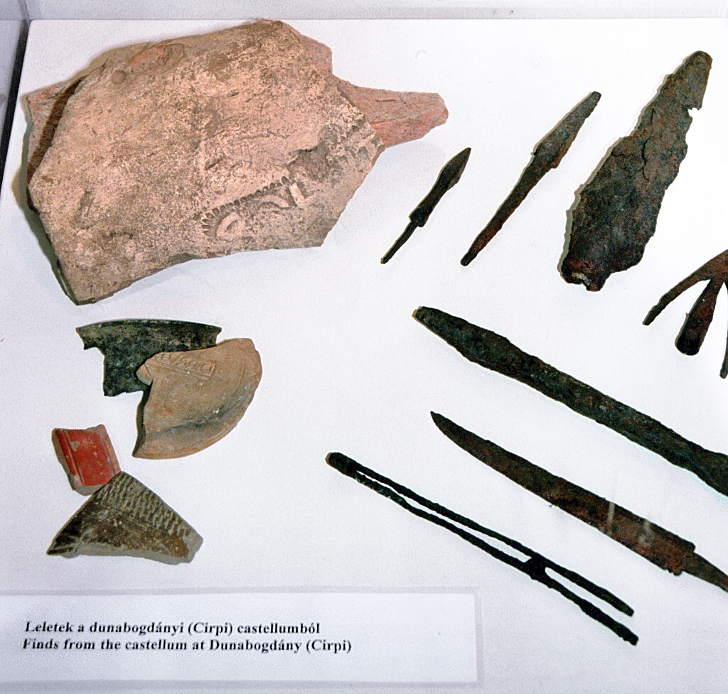 Kastell Dunabogdány (Cirpi), Ungarn: Fundmaterial aus dem Kastell. Aufgenommen während der provinzialrömischen Sonderausstellung „Visegrád évszázadai – A római kor kezdete a Dunakanyarban“ die vom 19.08.2011 bis 20.07.2012 im Mátyás Király Múzeum (König-Matthias-Museum), Visegrád, stattfand.